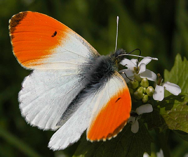 Aurorafalter (Anthocharis cardamines), aufgenommen am Hoheberg in Großen-Buseck